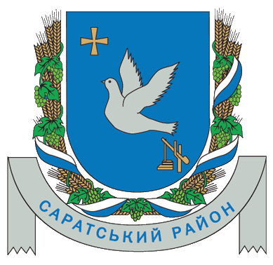 Герб Саратського району